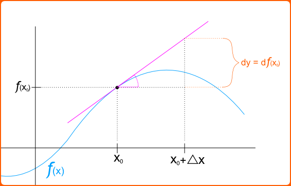 Representación geométrica en el par de ejes cartesianos del diferencial de una función